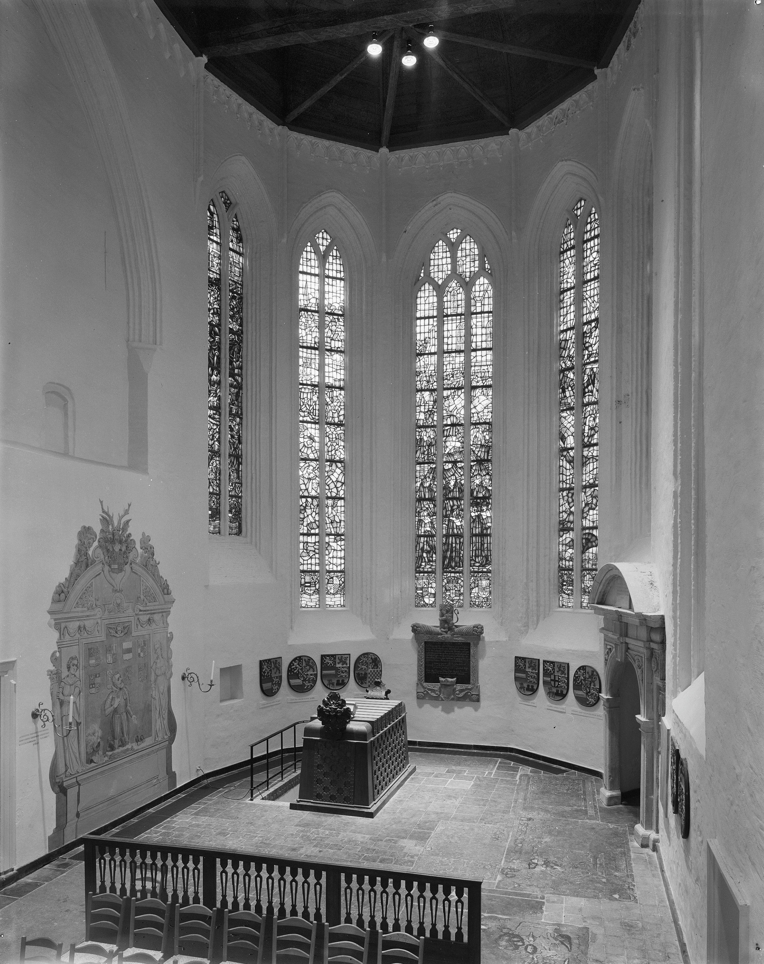 Hervormde Grote of Jacobijnerkerk: interieur naar het koor